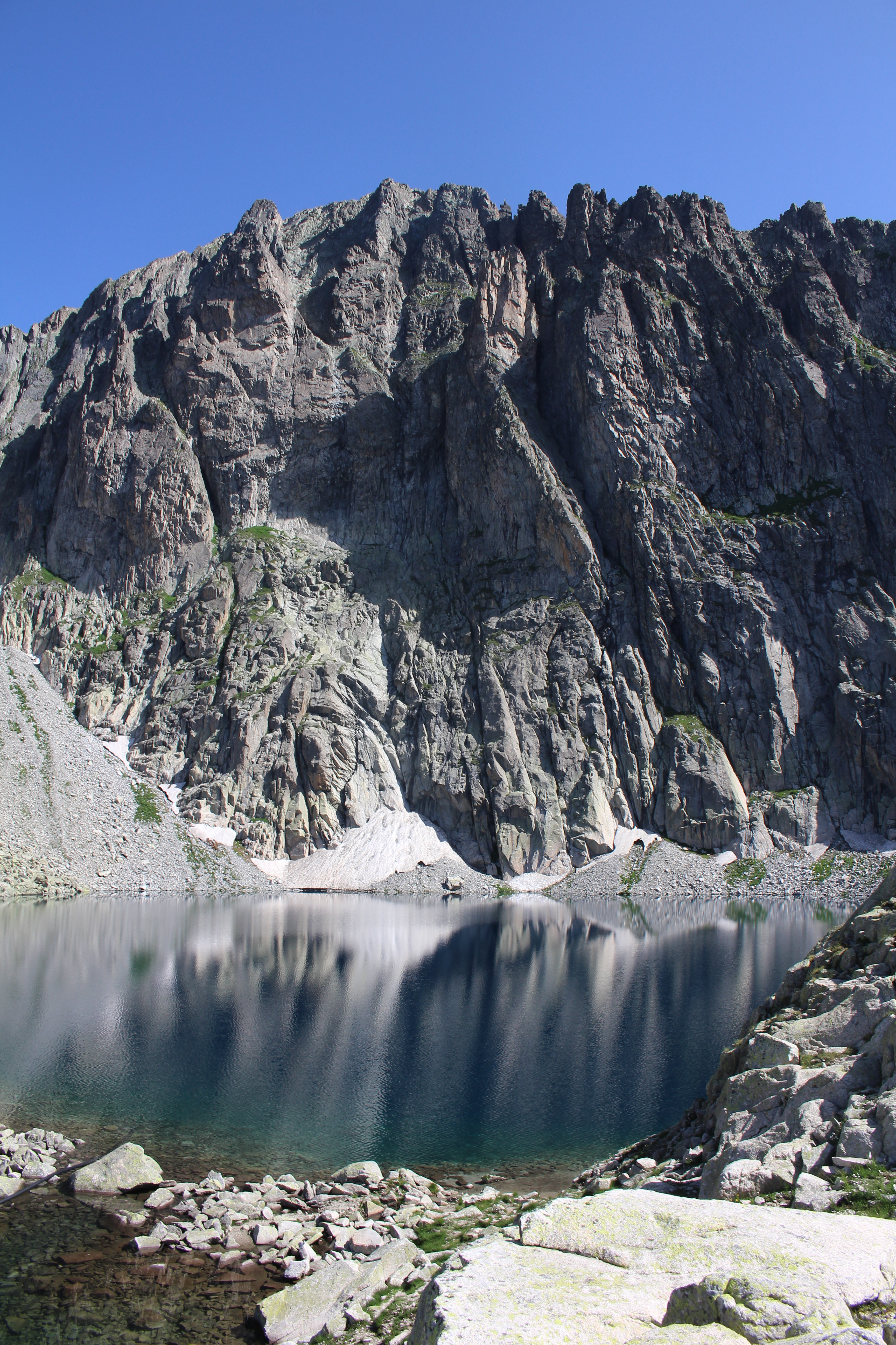 Il Lago di Cima d'Asta, vicino al Rifugio Ottone Brentari. Dietro la maestosa parete est di Cima d'Asta